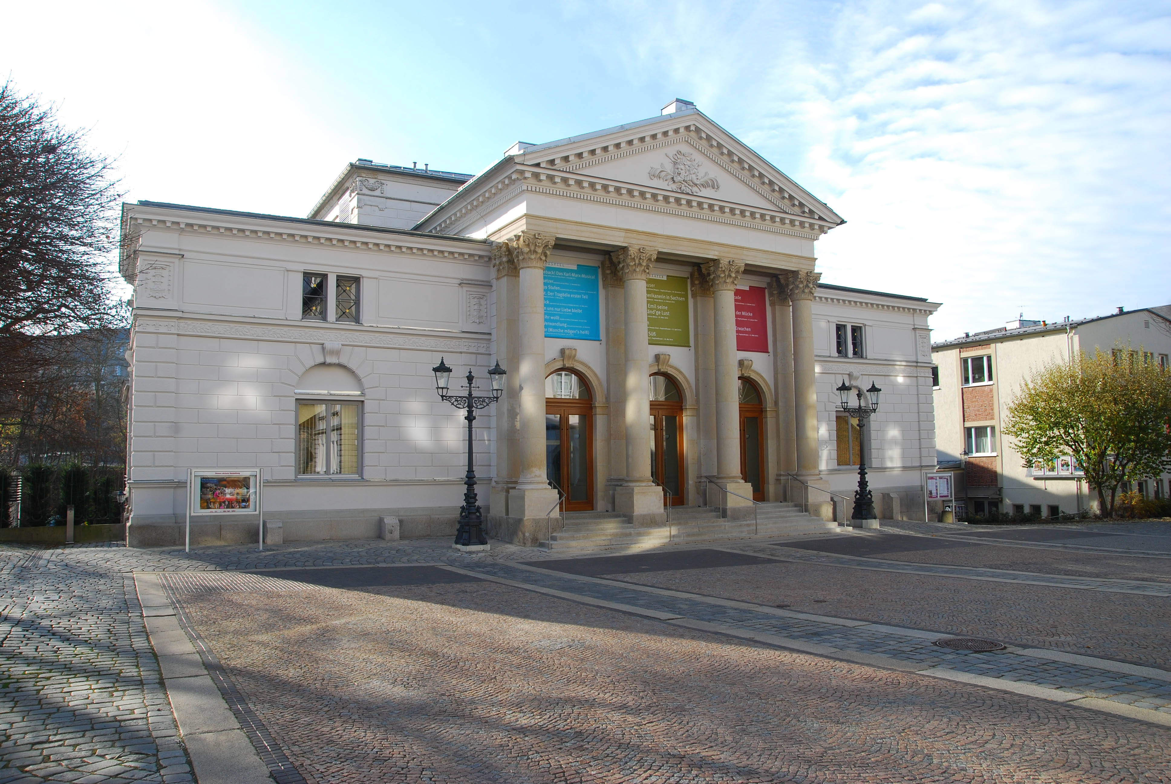 in Plauen